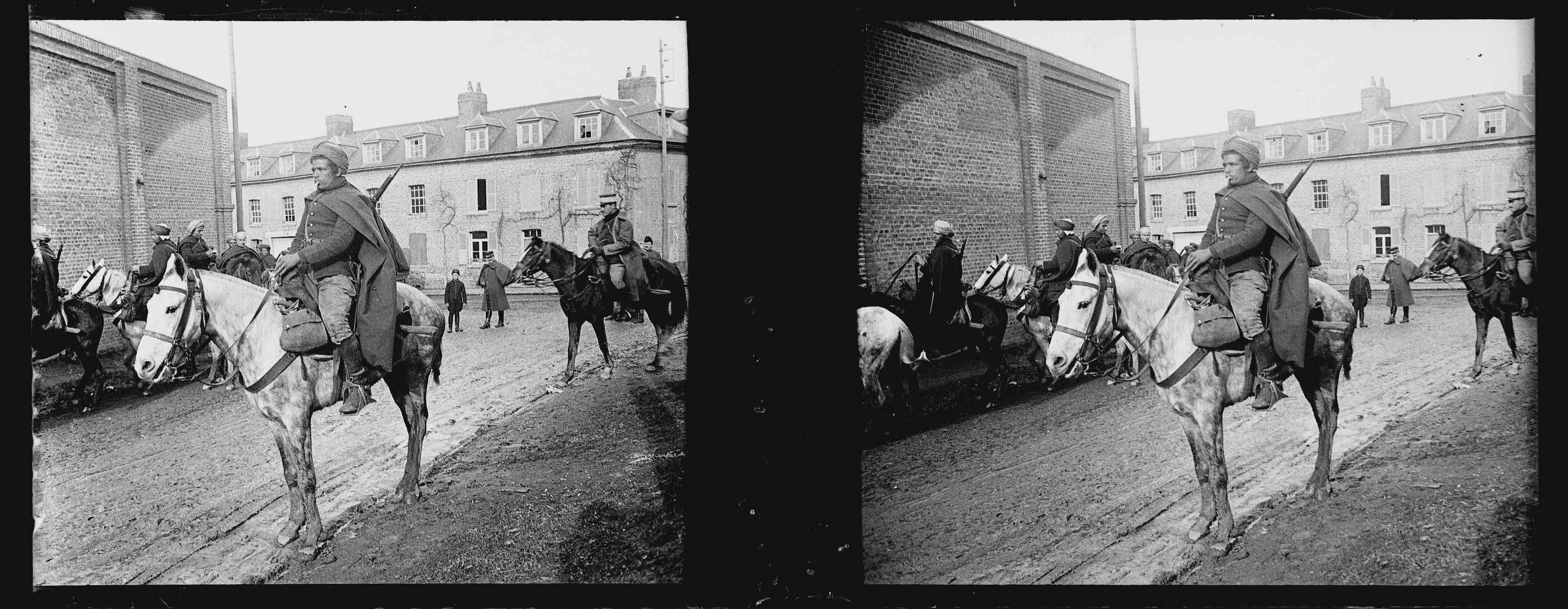 Portrait à cheval d'un goumier lors du passage de son régiment à Saleux (Somme). Mai-Juin 1915. Guerre 1914-1918.